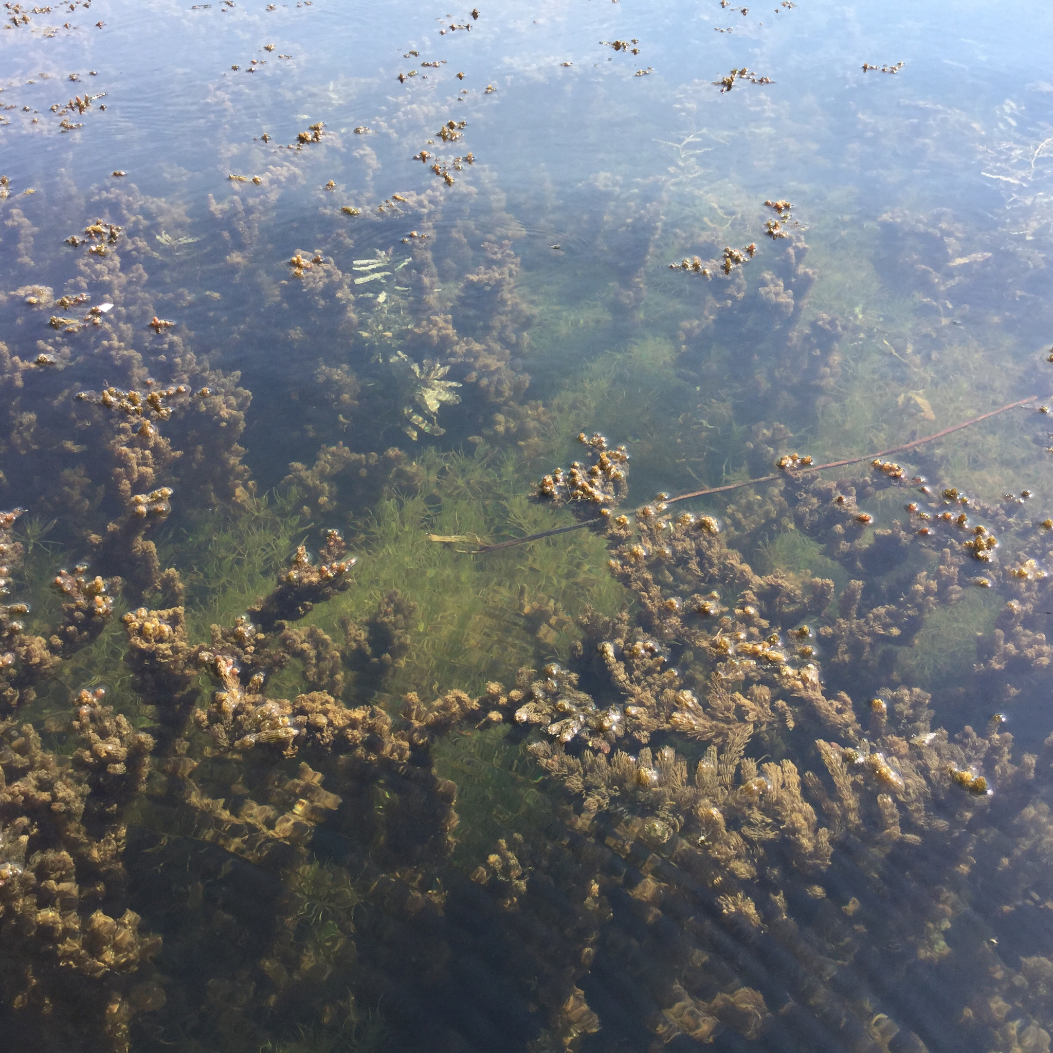 Najas minor with Ceratophyllum sp. in Nimisila Reservoir, Green, Ohio, USA